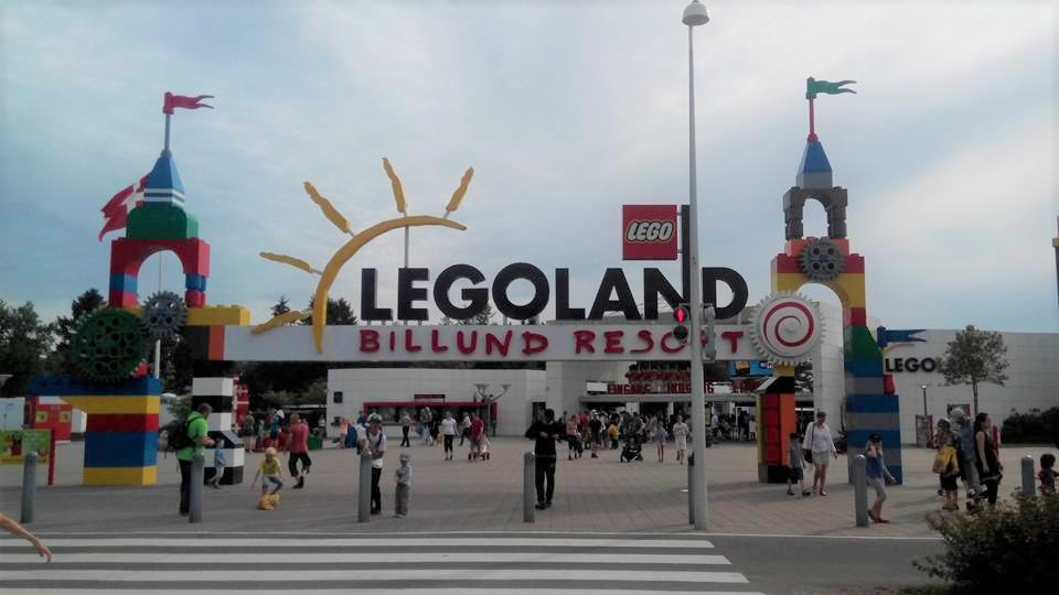 Ingresso del parco divertimenti Legoland a Billund, in Danimarca